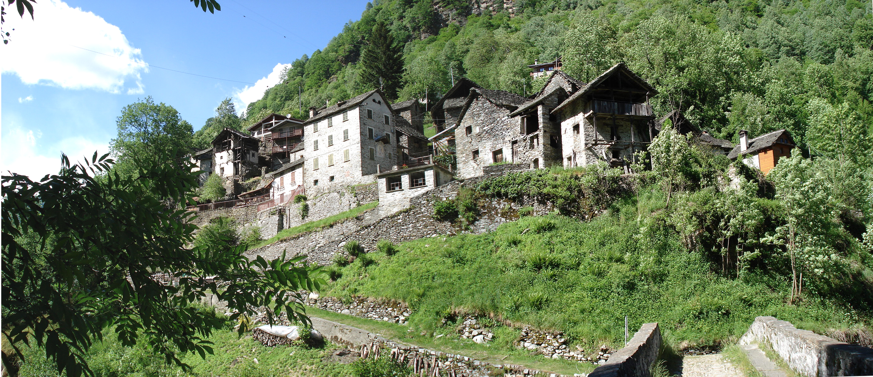 Vue du hameau de Piaggiogna sotto depuis le petit pont sur le torrent Sermenza.